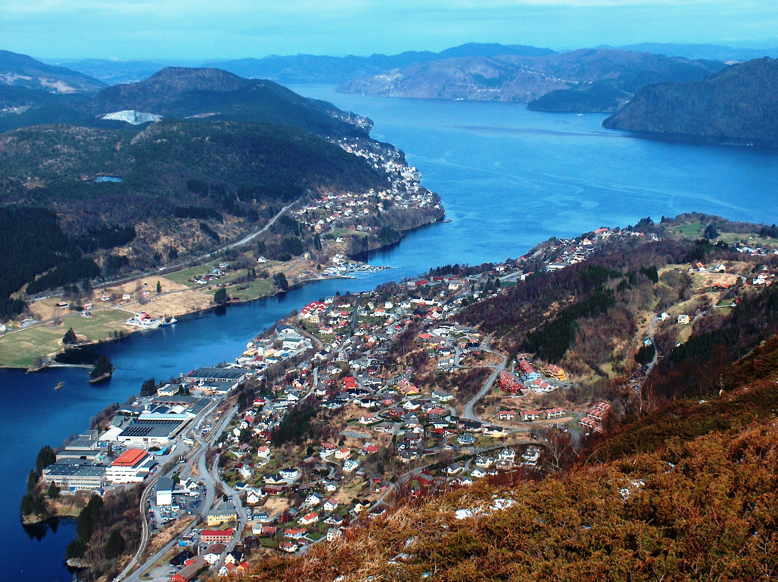 Fra Ådnanipa mot Ytre Arna